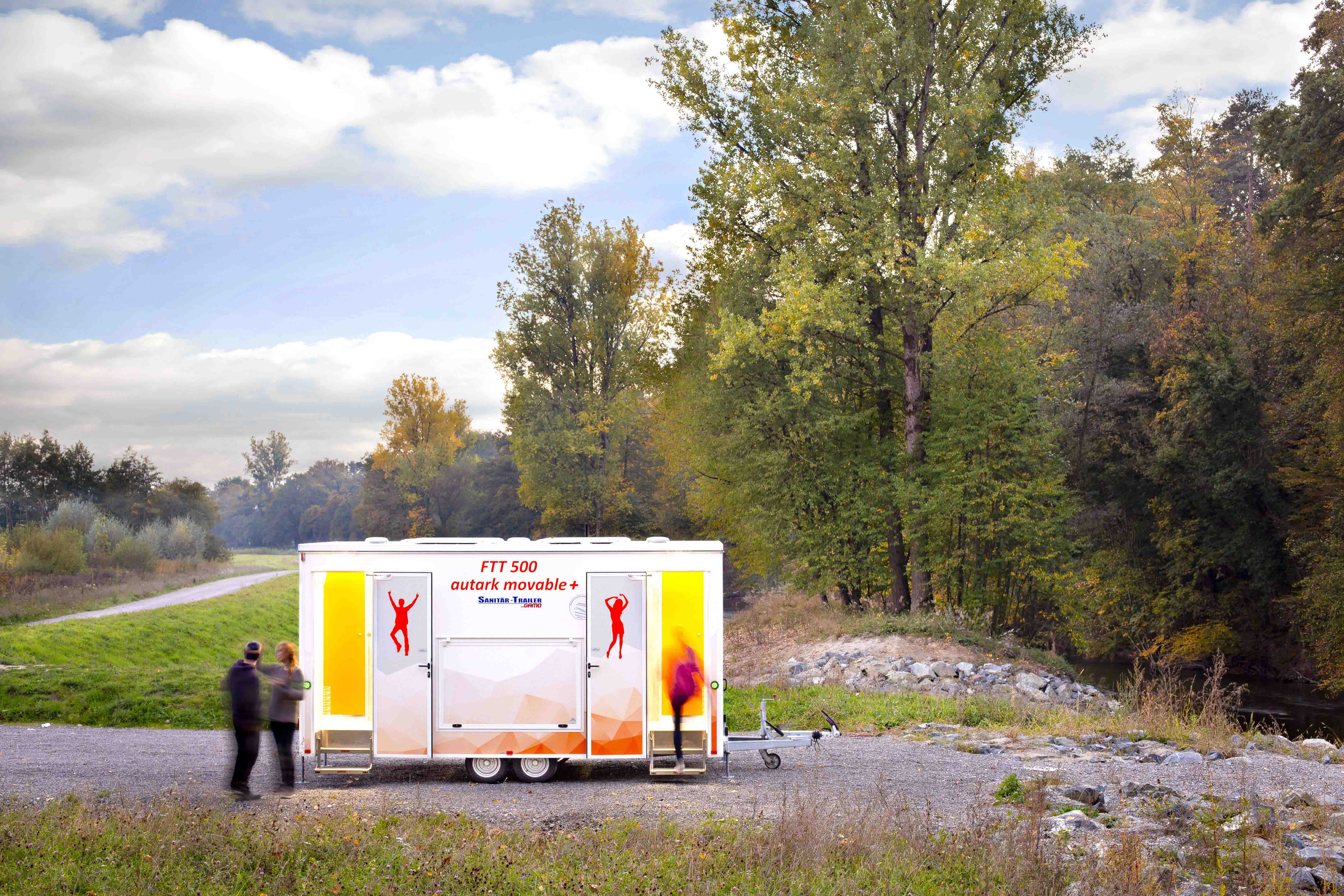 vollkommen autarker Toilettenwagen befüllt fahrbar